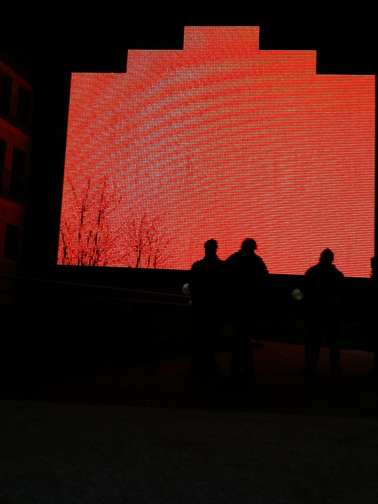 Es la pantalla LED gigante de Medialab, en Prospects Heights, Nueva York, Estados Unidos.